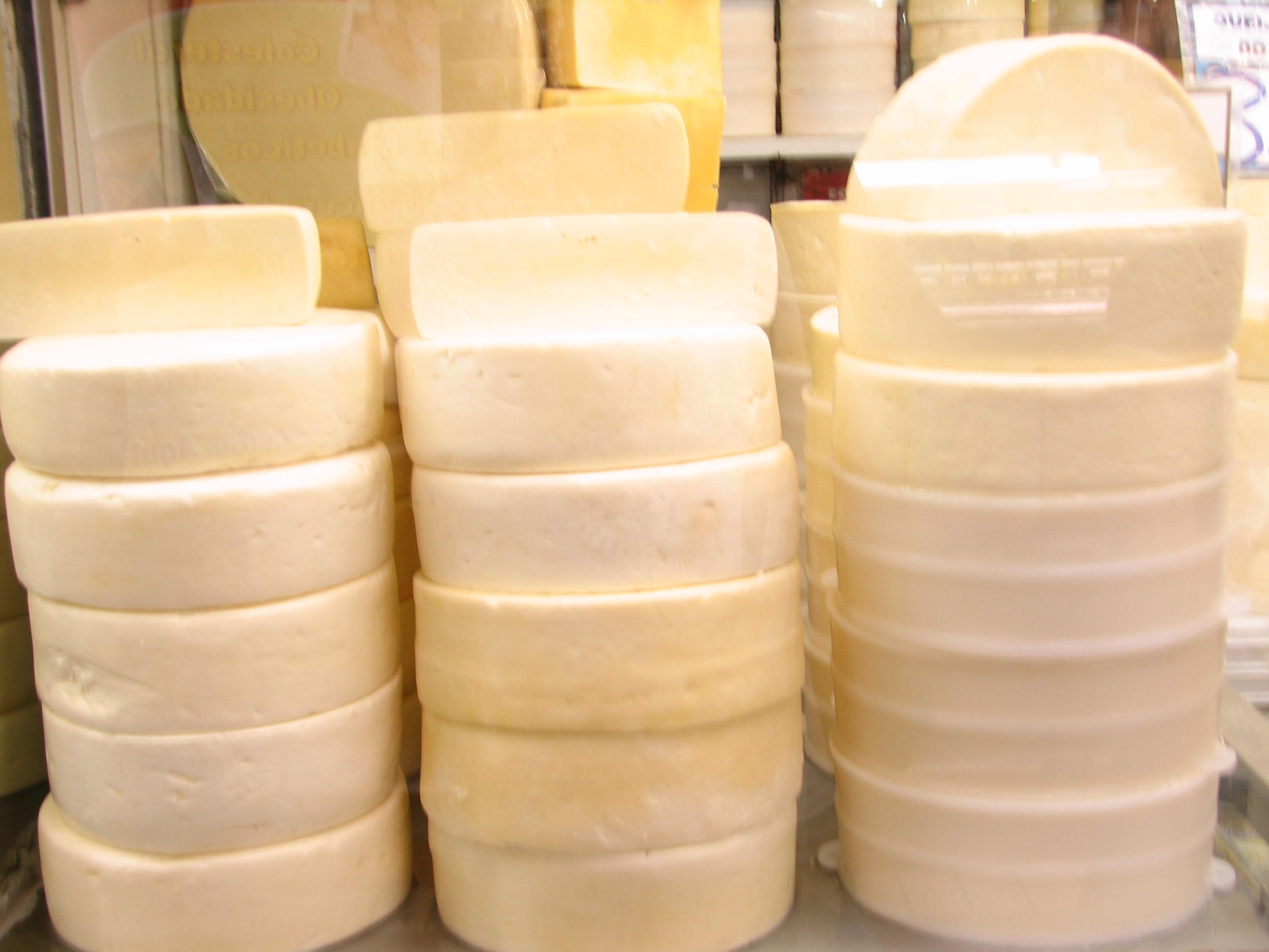 Queijo da Canastra, uma iguaria da cozinha do Brasil